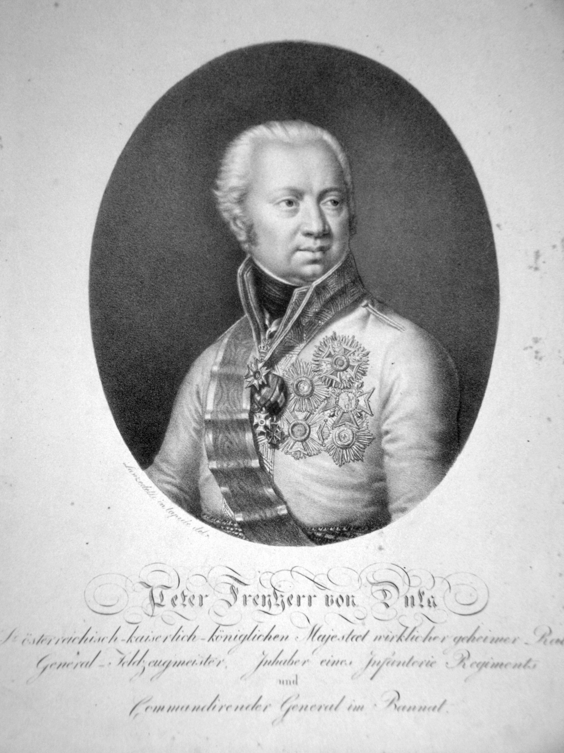 Peter Freiherr Duka von Kádár (1756-1823), k. k. Feldzeugmeister, Ritter des Maria-Thresien-Ordens etc. Lithographie von Josef Lanzedelly d. Ä., um 1820